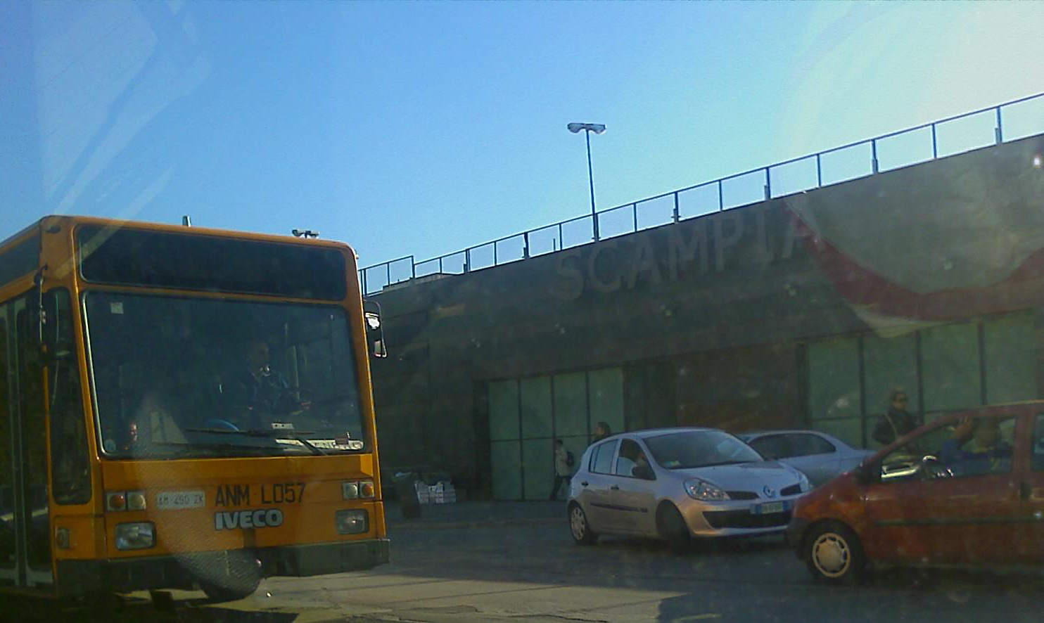 Stazione Piscinola della metropolitana di Napoli